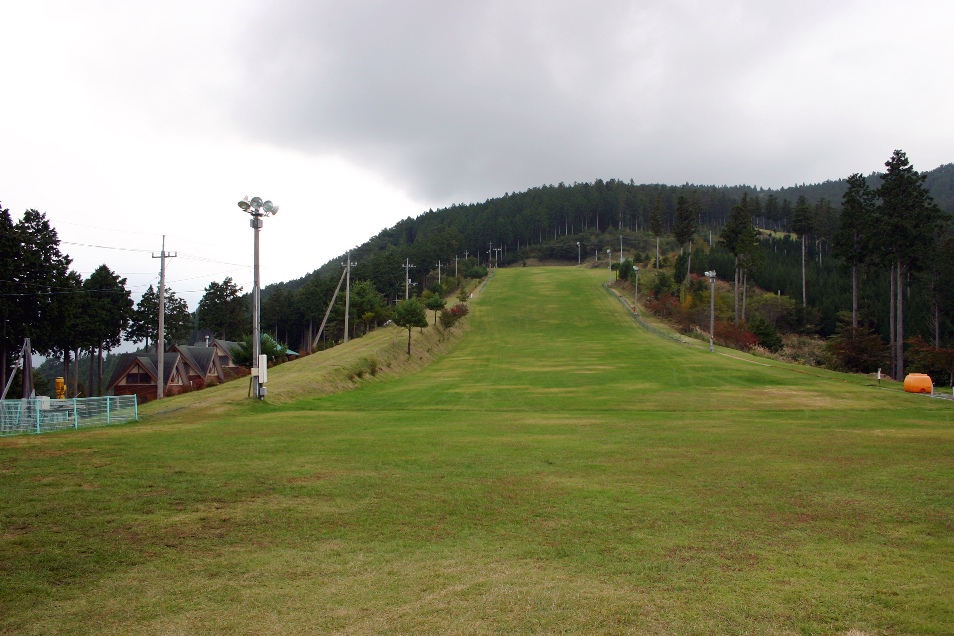 The grasski slope in Koyadaira, Mima-shi, Tokushima-ken, Japan